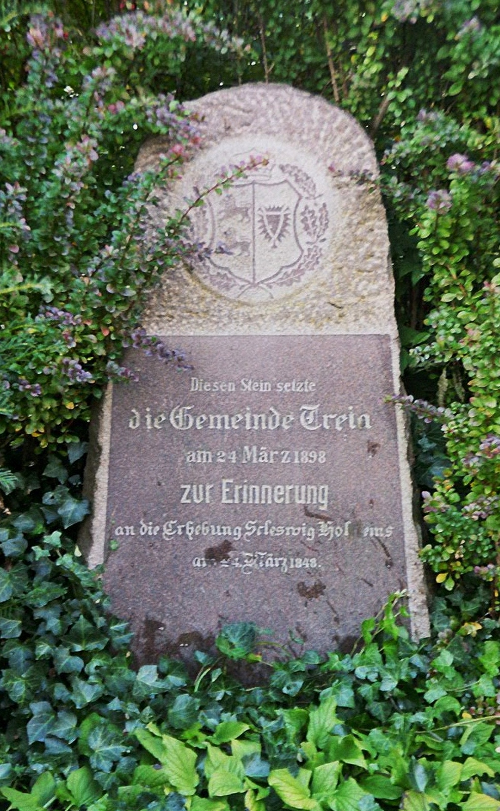 Source: made by WikiTour 2005 Description: (de:) Gedenkstein in Treia; Wortlaut: Diesen Stein setzte die Gemeinde Treia am 24. März 1889 zur Erinnerung an die Erhebung Schleswig-Holsteins am 24. März 1848 - (Stichworte: Märzrevolution und Schleswig-Holsteinischer Krieg)